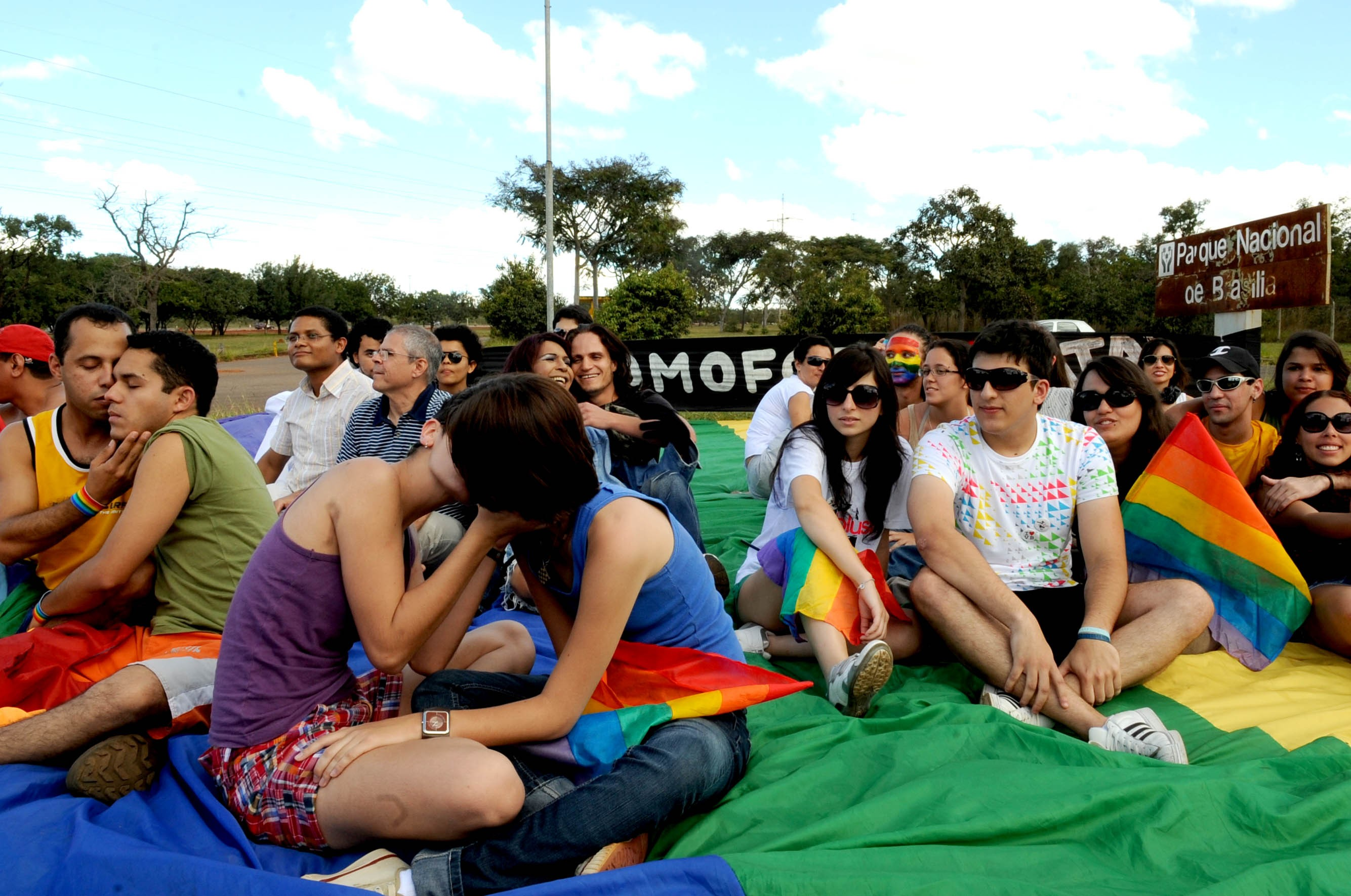 Manifestação contra Homofobia-Parque da Cidade-Brasília-DF